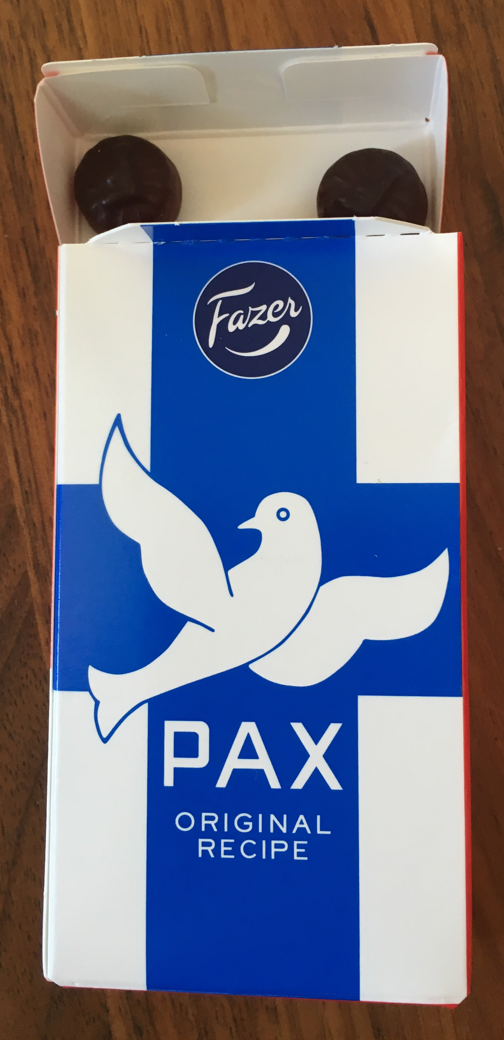 Pax aski 2016